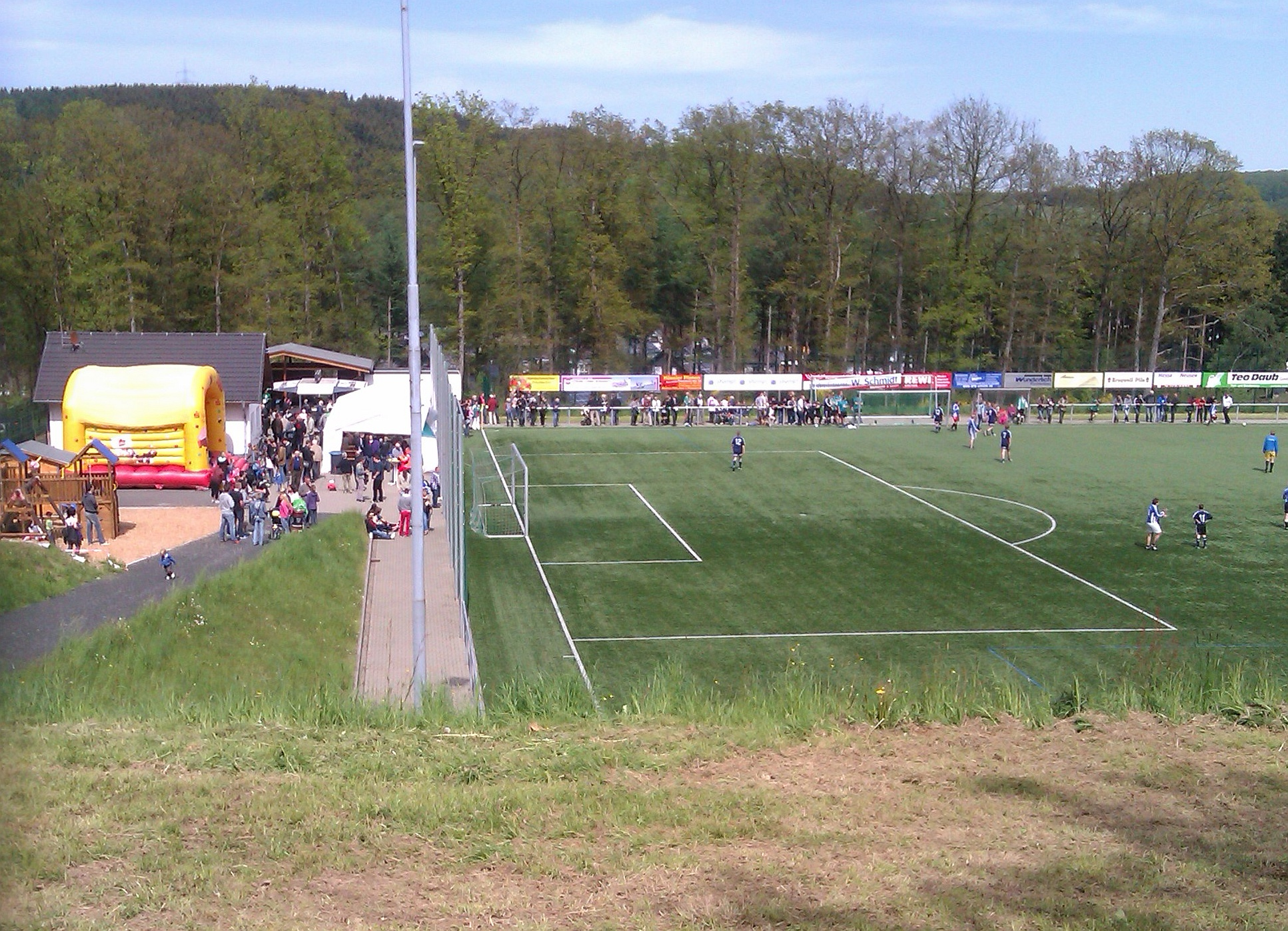 Das Straßenfußballturnier 2012 an Christi Himmelfahrt am Sportplatz in Wilden, Wilnsdorf.